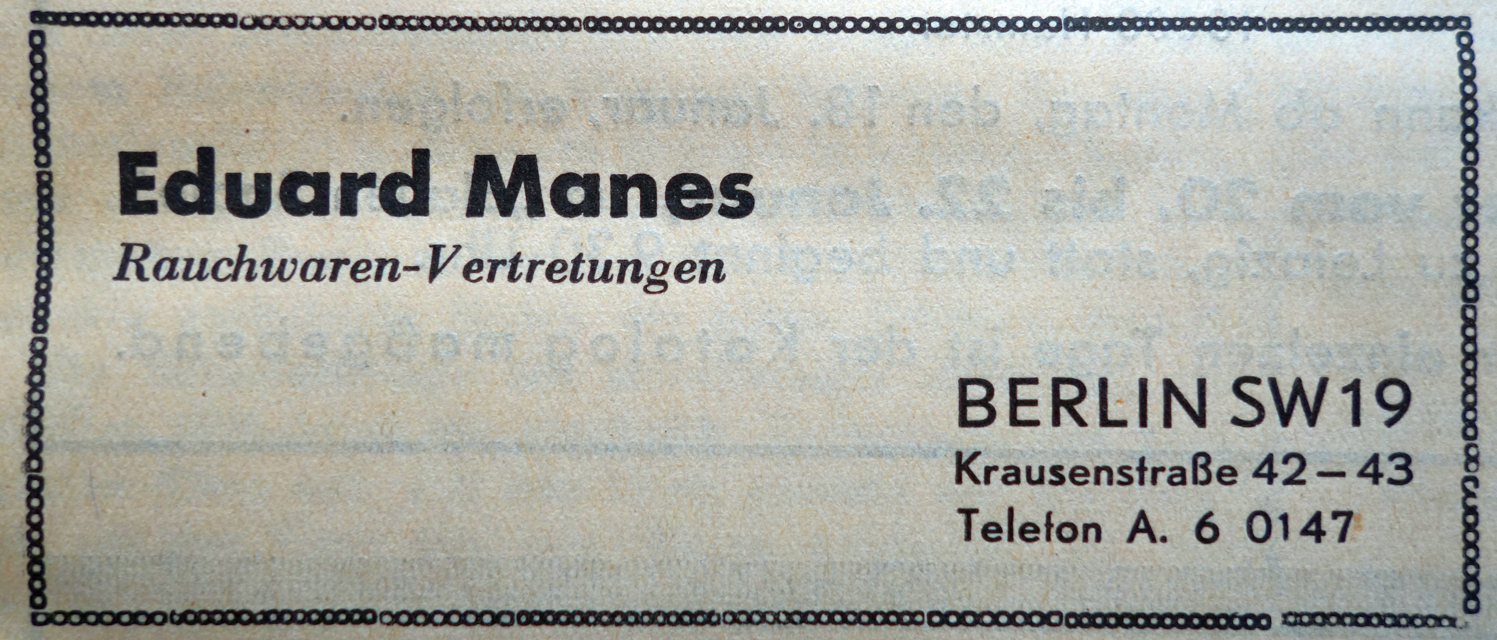 Eduard Manes, Rauchwaren-Vertretungen, Berlin SW 19, Krausenstraße 42-43. Anzeige in einer Fachzeitung 1937. Anmerkung: Der Sohn Philipp Manes (* 16. August 1875 in Elberfeld; † nach dem 28. Oktober 1944 im KZ Auschwitz-Birkenau) war ein jüdischer Berliner Pelzhändler und Tagebuchautor, dem es gelang, im Ghetto Theresienstadt mehr als zwei Jahre ein relativ reichhaltiges kulturelles Leben aufrechtzuerhalten. Philipp Manes trat 1904 in den Ende 1938 erloschenen elterlichen Großhandelsbetrieb mit Rauchwaren und Pelzzutaten ein, in dem er sich ausschließlich dem Pelzhandel widmete. 1920 gründete er während seiner beruflichen Aktivitäten den Verband Berliner Rauchwarenfirmen, deren Vorsitzender er sieben Jahre lang blieb. Anschließend widmete er sich ganz der Berichterstattung für die Fachzeitschriften der Branche im In- und Ausland. Wesentlich war er an der Ausrichtung der bisher weltweit bedeutendsten Selbstdarstellung der Pelzbranche, der IPA - Internationale Pelzwaren-Ausstellung in Leipzig beteiligt.